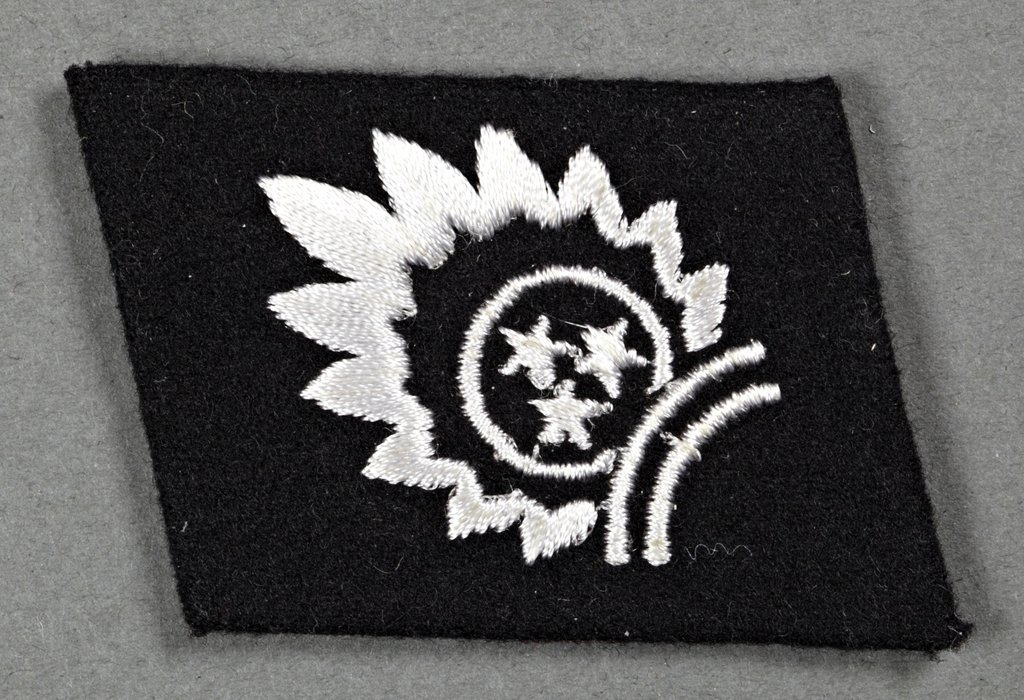 15.SS